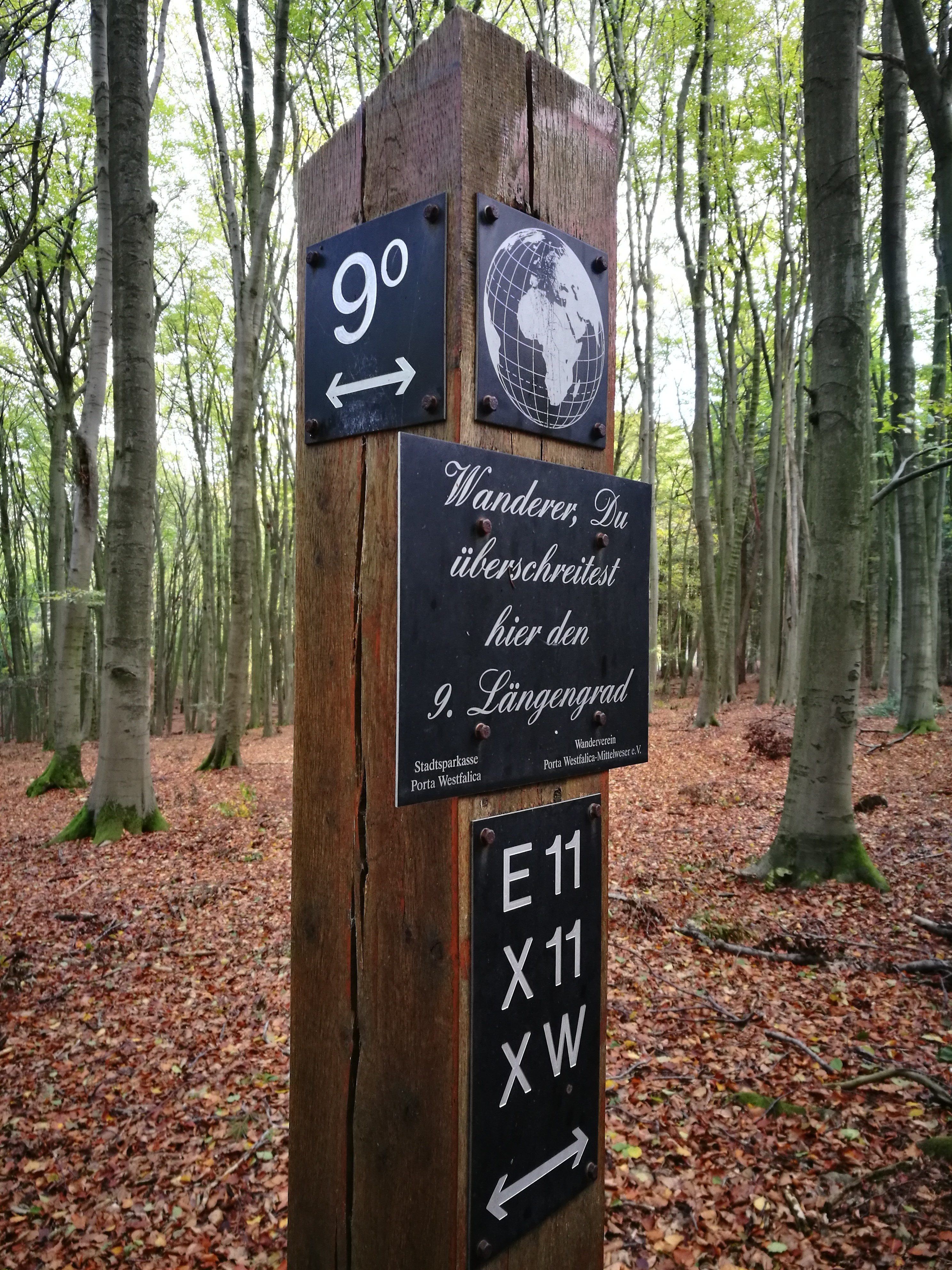 Deutschland (D) - Nordrhein-Westfalen (NW) - Landkreis Minden-Lübbecke (MI) - Porta Westfalica: Bückeberge-Weg bei den Nammer Klippen, Hinweisschild "9. Längengrad"